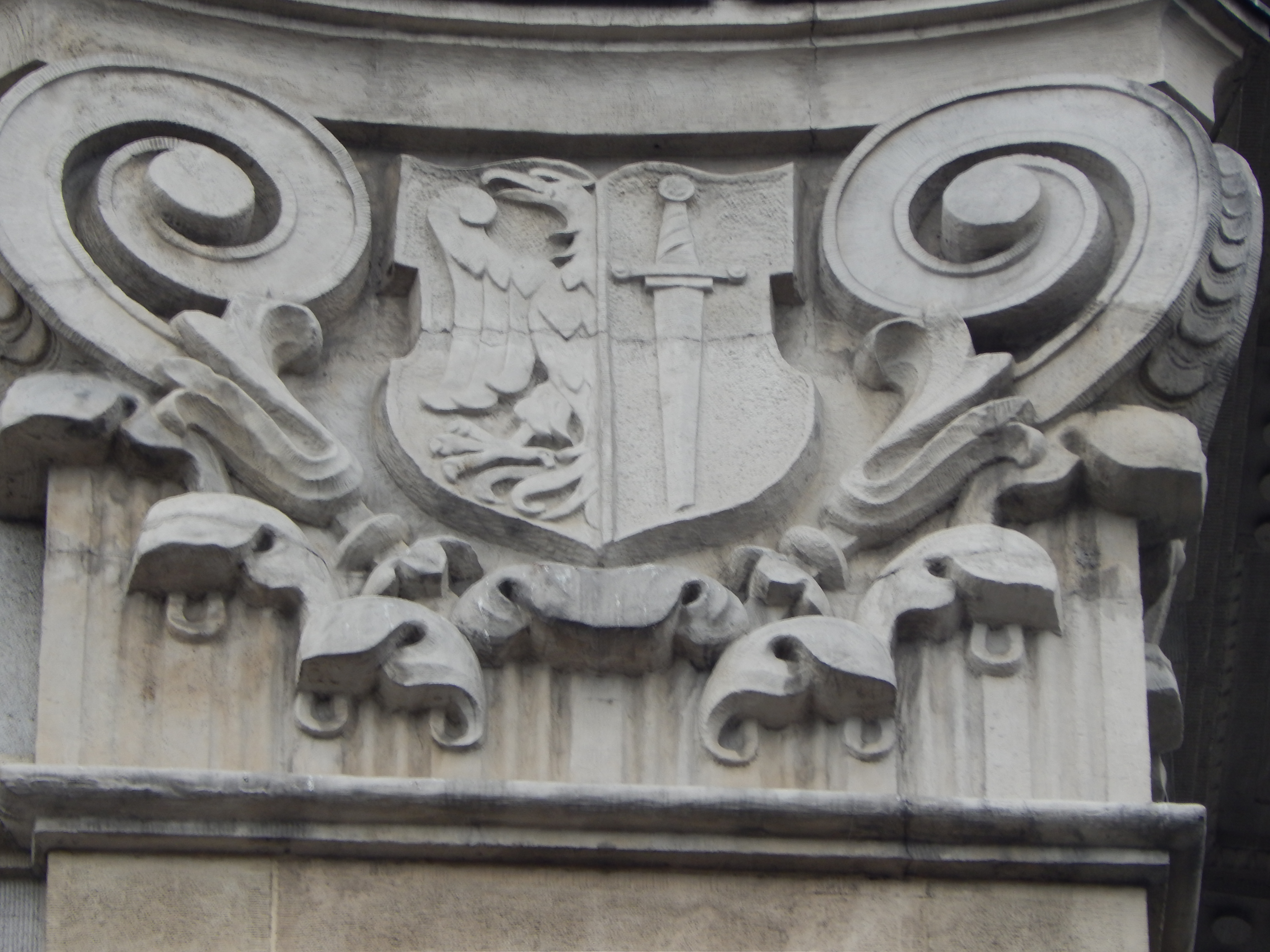 Fragment elewacji gmachu Sejmu Śląskiego - herb Żor